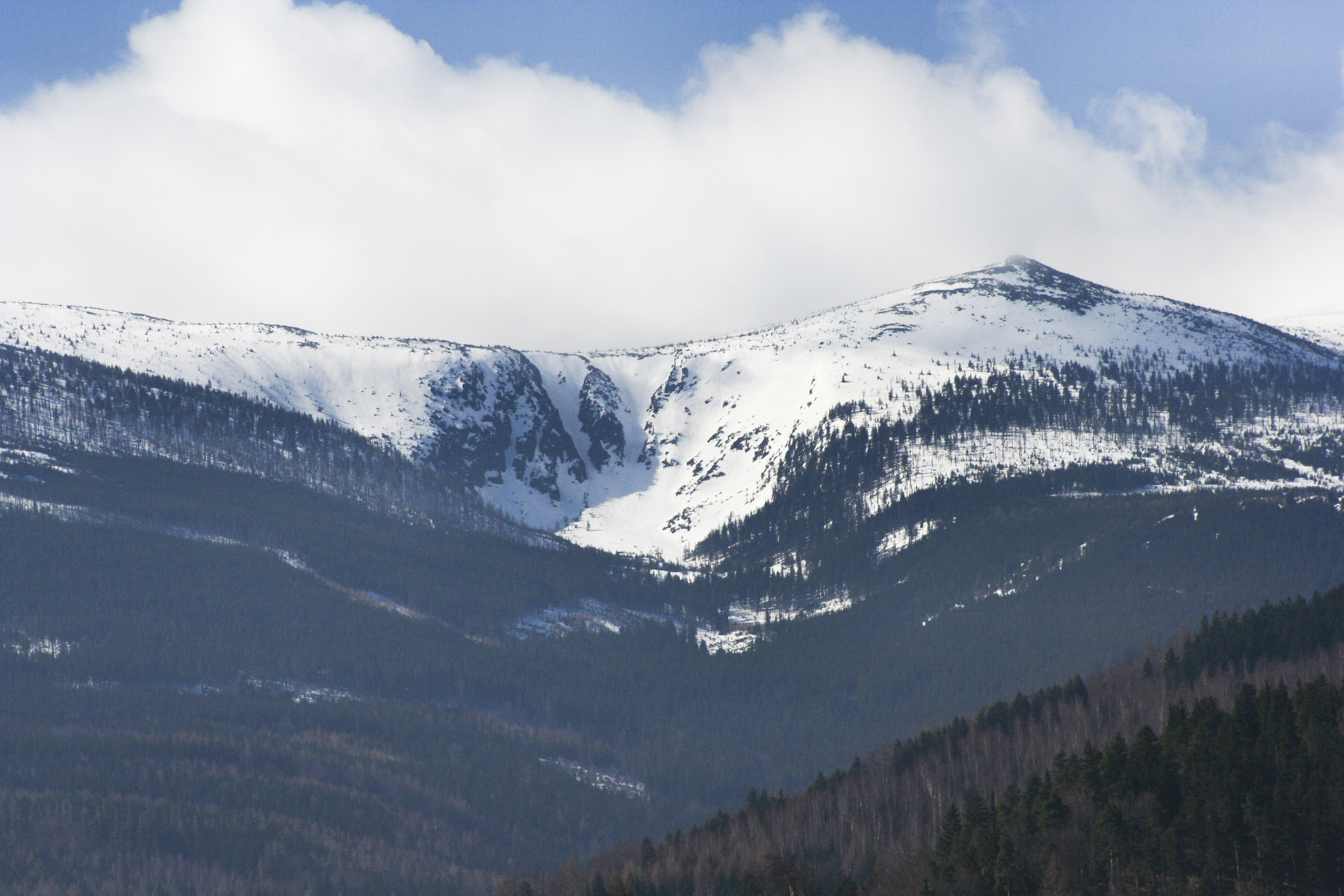 Czarny Kocioł Jagniątkowski in Karkonosze Mountains, Poland.